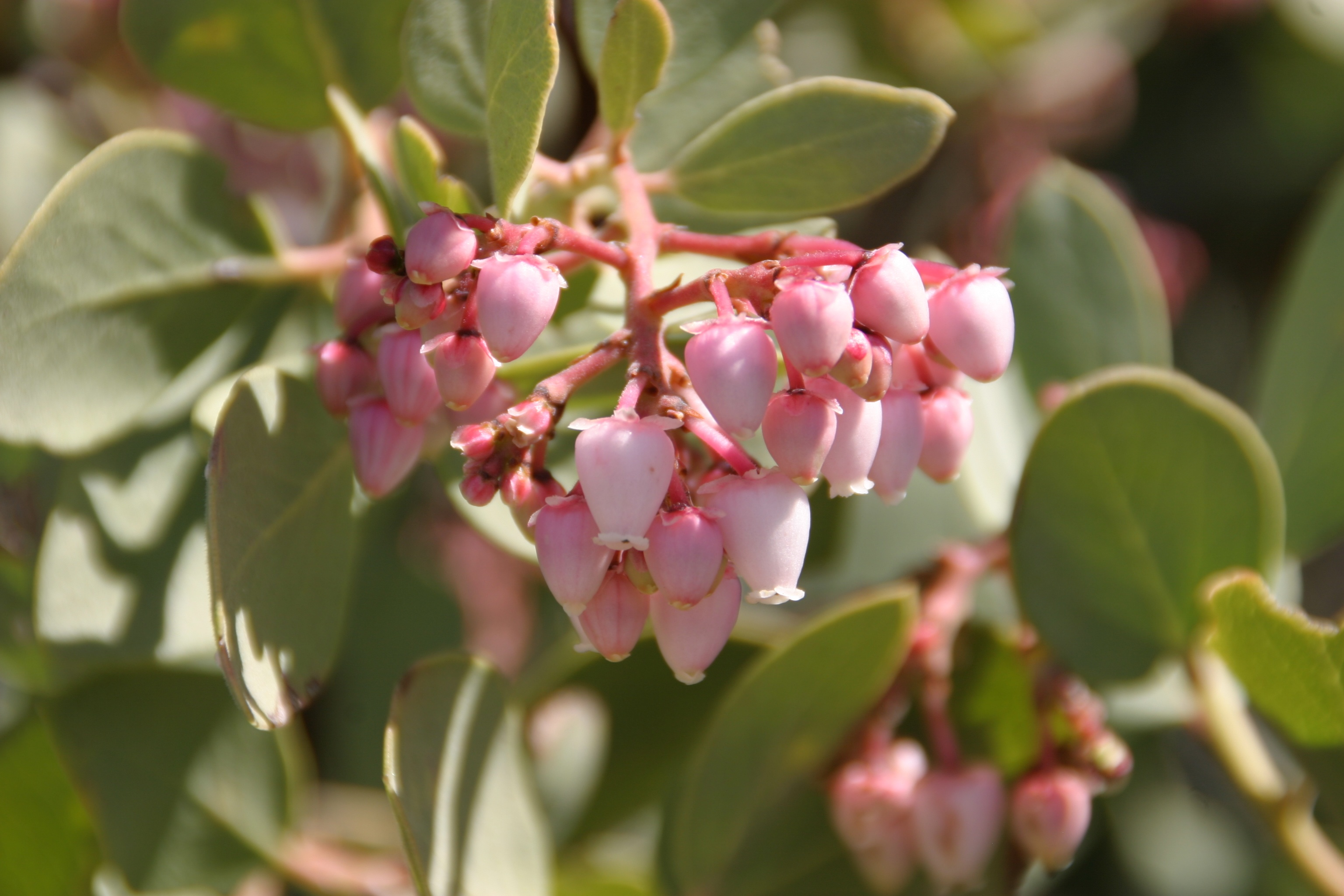 Arctostaphylos glauca — bigberry manzanita.